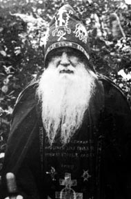 Схимонах Максим (в миру Матвей Георгиевич Пилипцев), Спасо-Преображенский монастырь, Бузулук